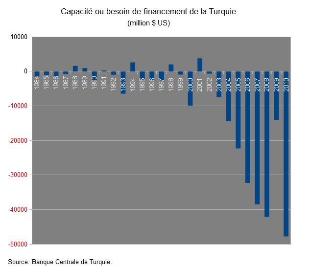 Capacité ou besoin de financement de la Turquie - Source: Banque Centrale de Turquie.